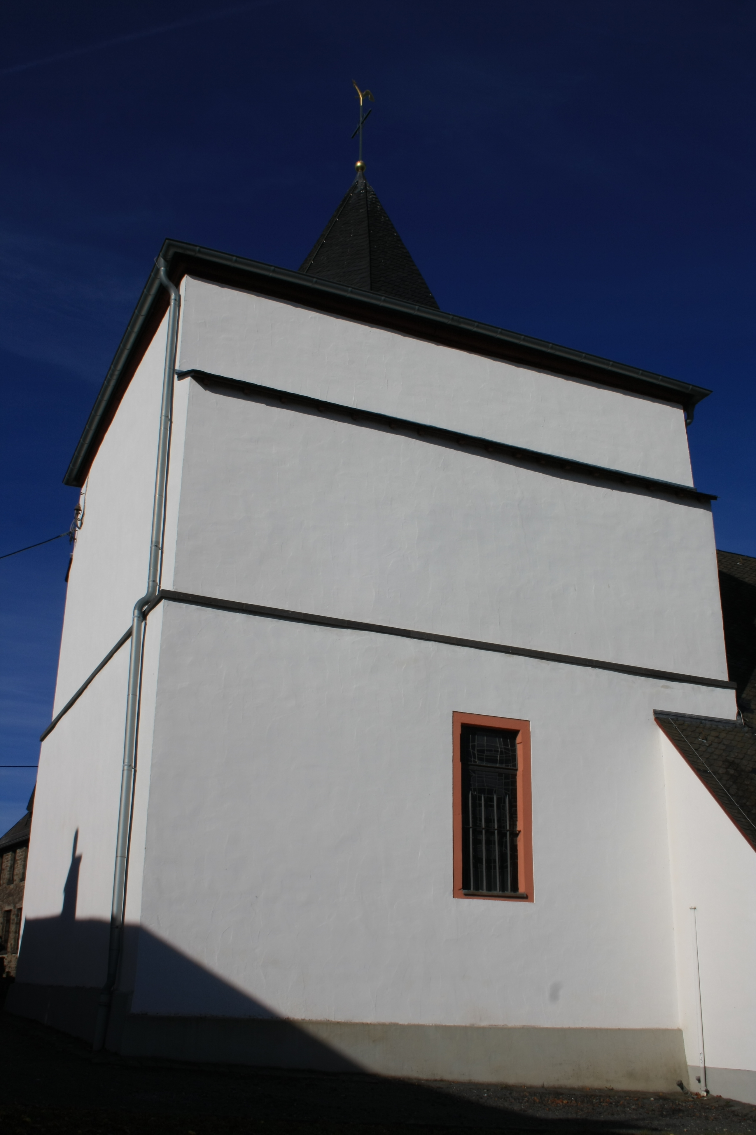 Katholische Pfarrkirche St. Sebastianus in Dorsel, romanischer Turm